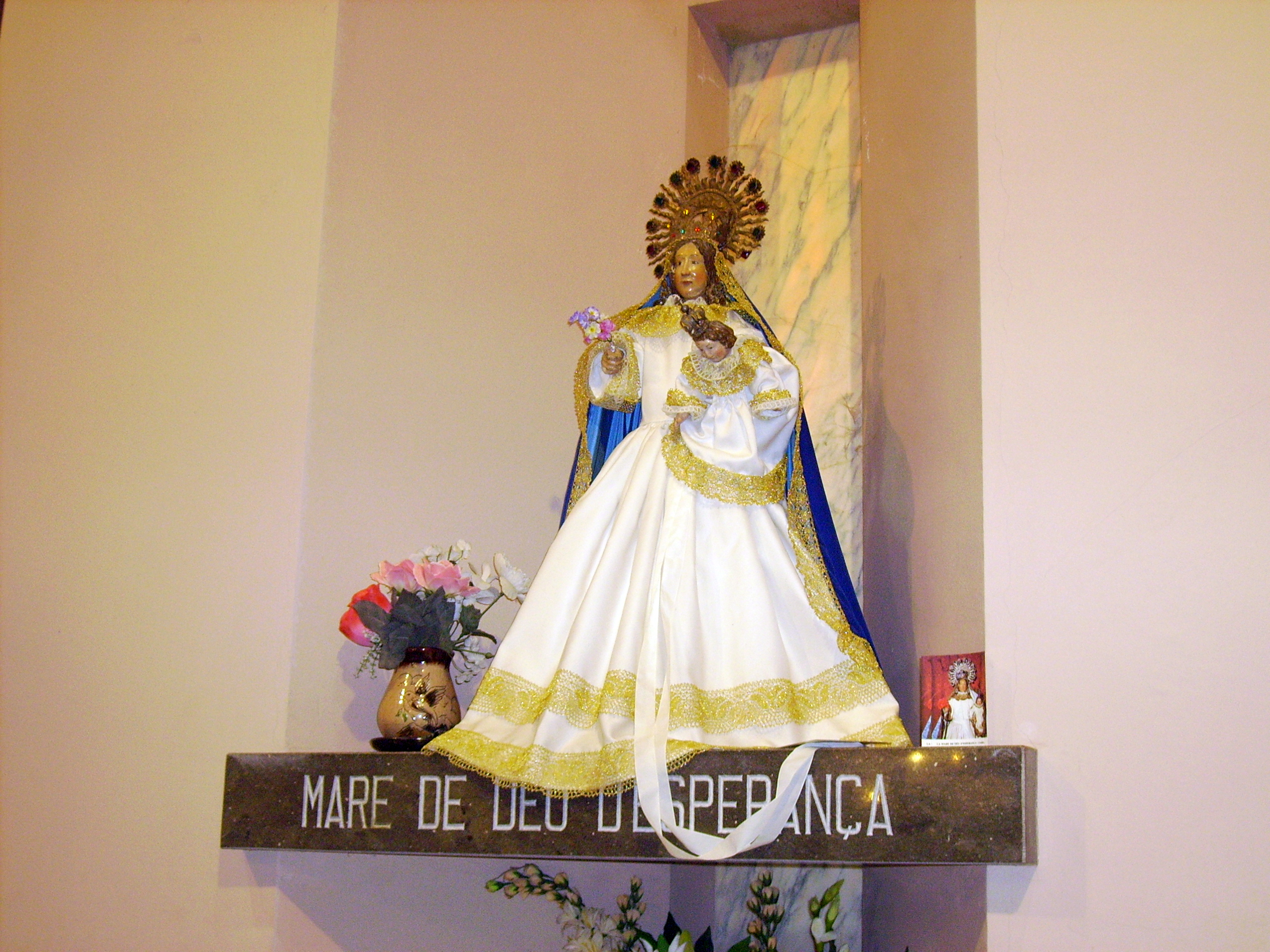 Santuari de la Mare de Déu de l'Esperança (Cruïlles, Monells i Sant Sadurní de l'Heura)